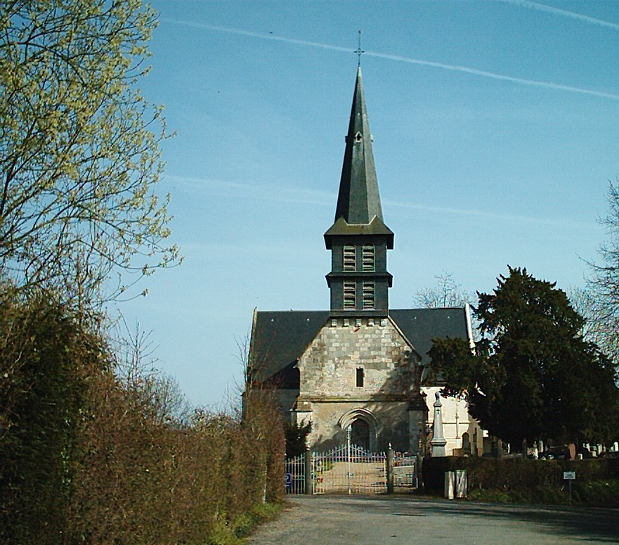 Église de Saint-Étienne-la-Thillaye